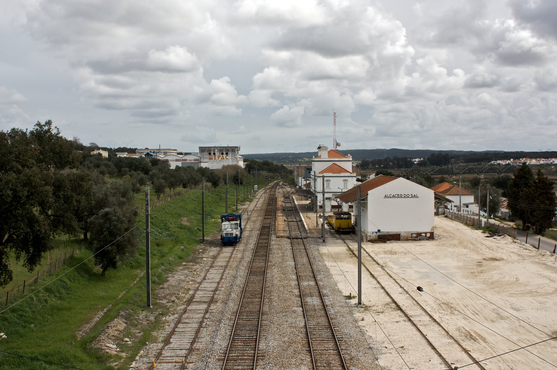 Tipo: EC Estação de Concentração Local: Alcácer do Sal [Linha do Sul, PK 78] Data e hora: 2 de Março de 2009 [13h04]